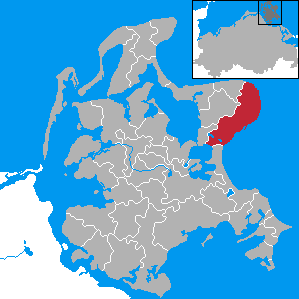 Sassnitz, Landkreis Rügen, Mecklenburg-Vorpommern